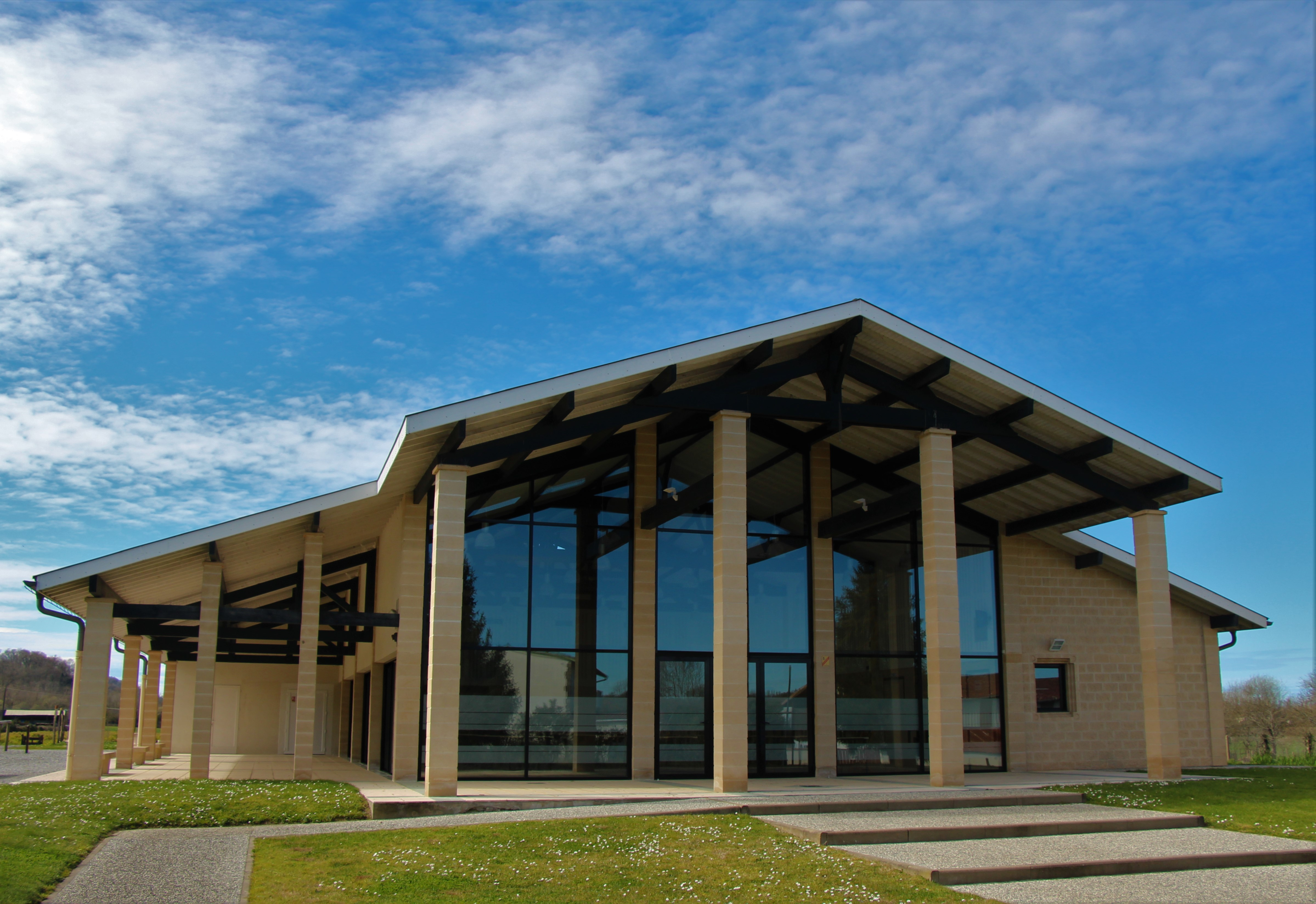 Salle des fêtes d'Oeyregave, Landes, France